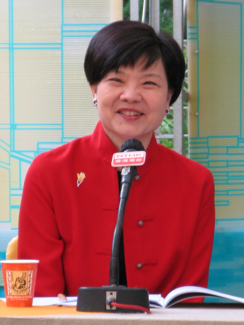 Audrey Eu Yuet Mee 余若薇